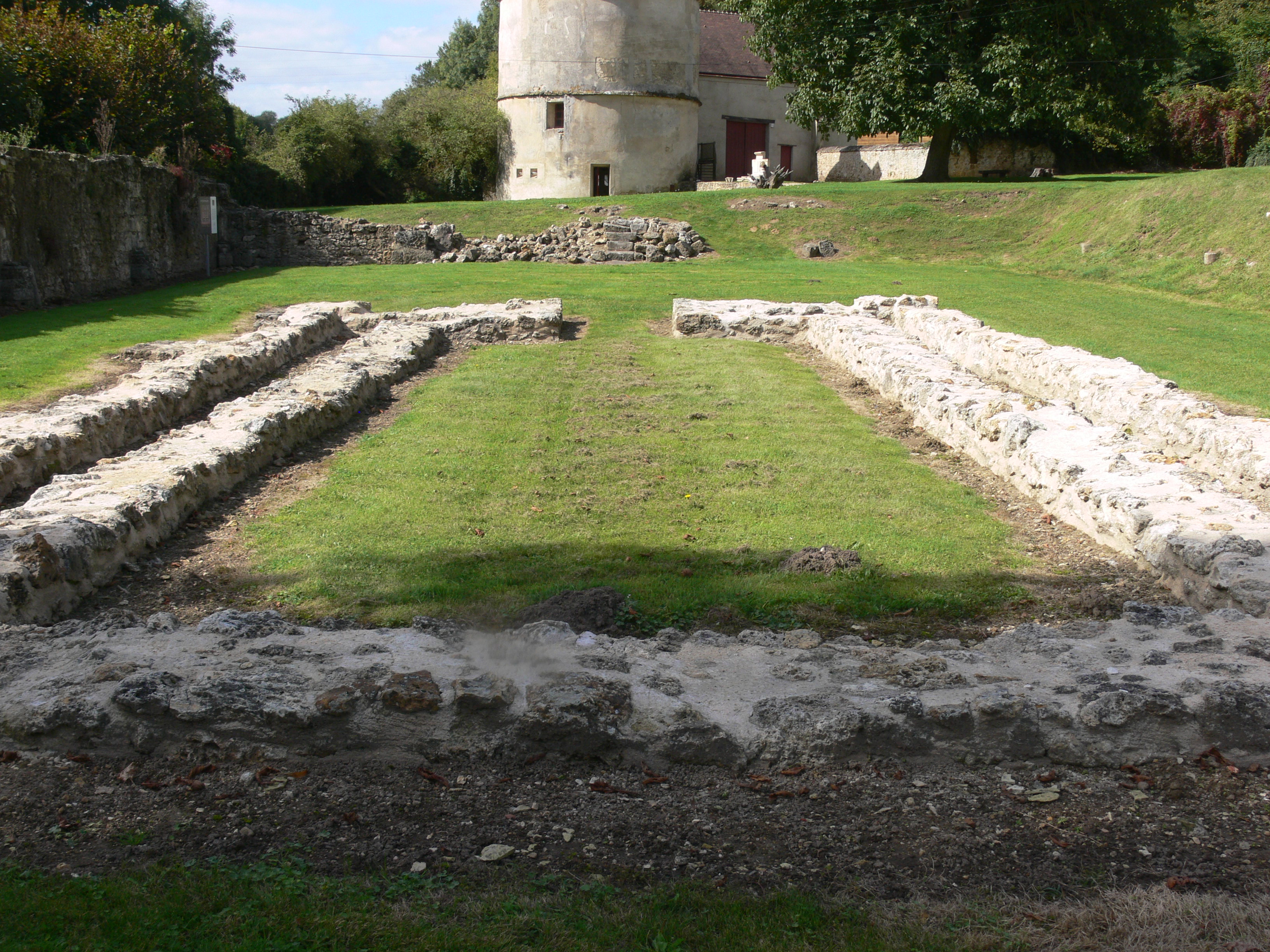 Port-Royal-des-Champs This building is en partie classé, en partie inscrit au titre des Monuments Historiques. .